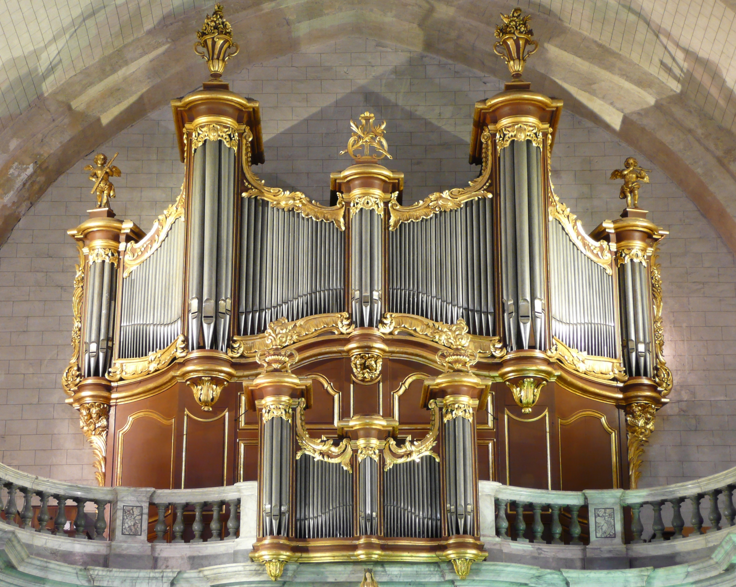 Orgue Micot éclairé artificiellement.